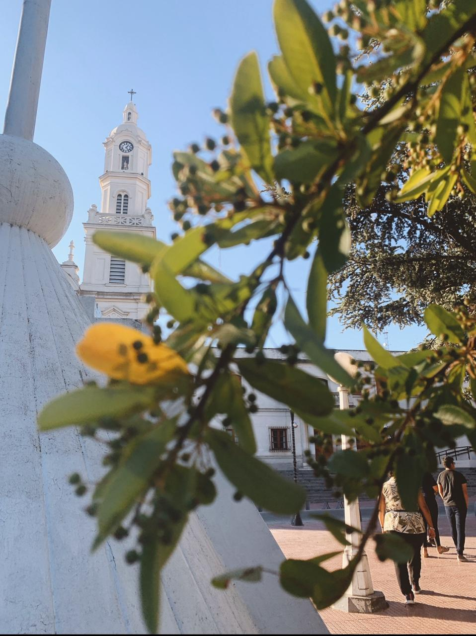 La parroquia se encuentra ubicada en la plaza central en la Comarca de Carmen de Patagones